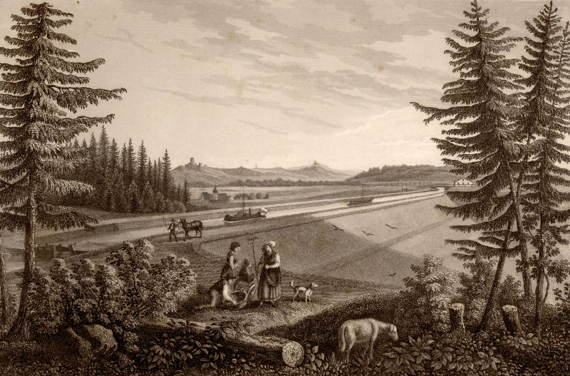 Der Grubenbacher = Damm bei Neumarkt. (Gruberbachdamm) Stahlstich von Alexander Marx aus dem Buch Pittoreske Ansichten des Ludwig-Donau-Main-Kanals. Gezeichnet, auf Stahl gestochen und herausgegeben von Alexander Marx. 1845. Kupferstecher in Nürnberg. Das Bild zeigt den Grubenbachdamm bei Kettenbach (Berg bei Neumarkt in der Oberpfalz).